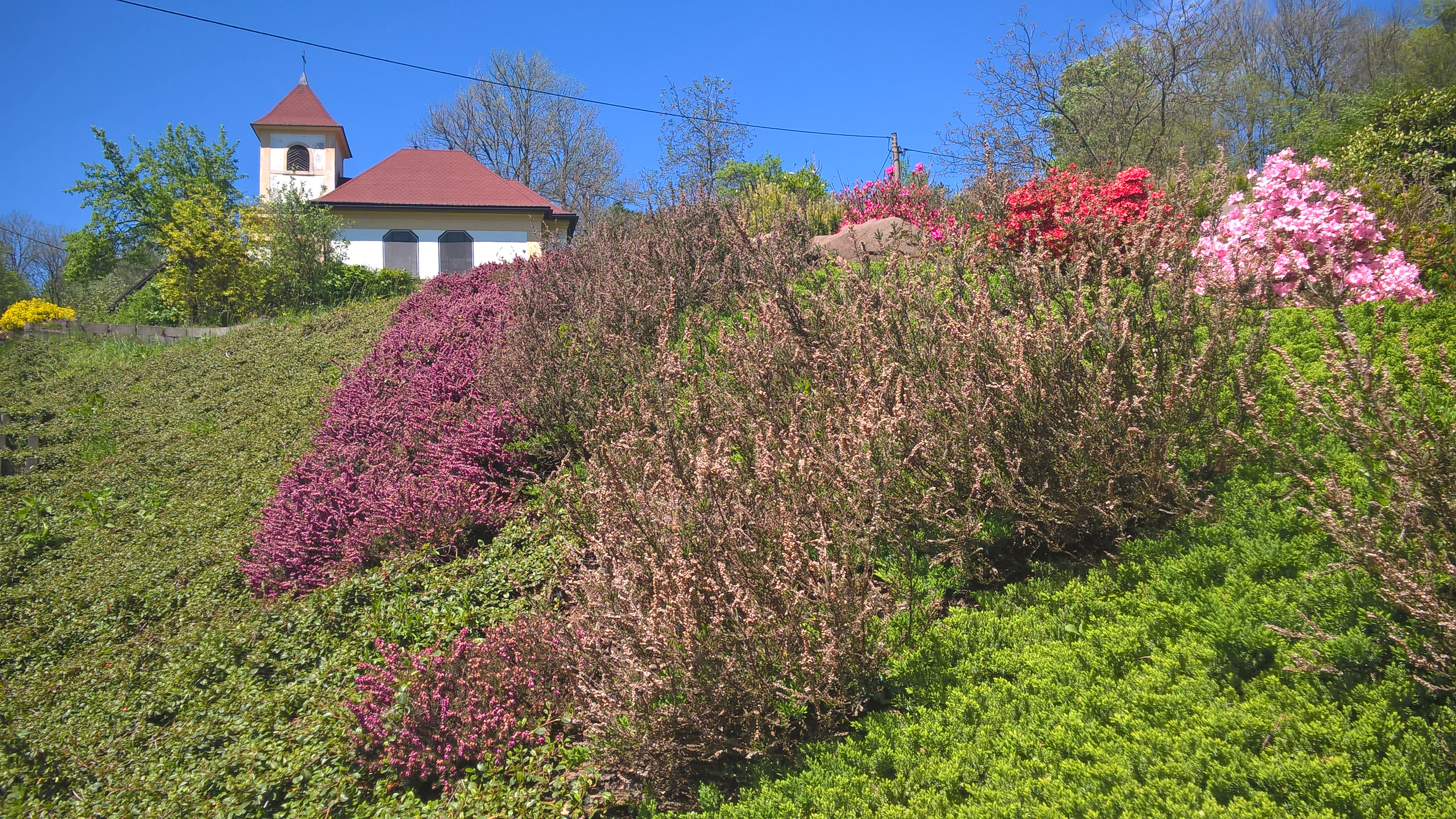 Radoňovice (u Hodkovic nad Mohelkou) - kaplička